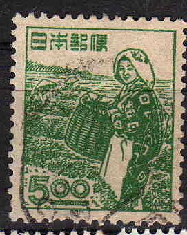 japanese stamp（日本の普通切手）描かれているのは茶摘に従事する労働者である。